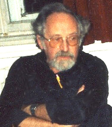 Porträt Hans-Joachim Oeffler, Oktober 1991